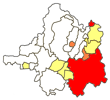 Densidad de población en la comarca de La Jacetania Blanco 0-5 hab/km2 Amarillo 5-10 hab/km2 Naranja 10-20 hab/km2 Marrón 20-30 hab/km2 Rojo 30-40 hab/km2